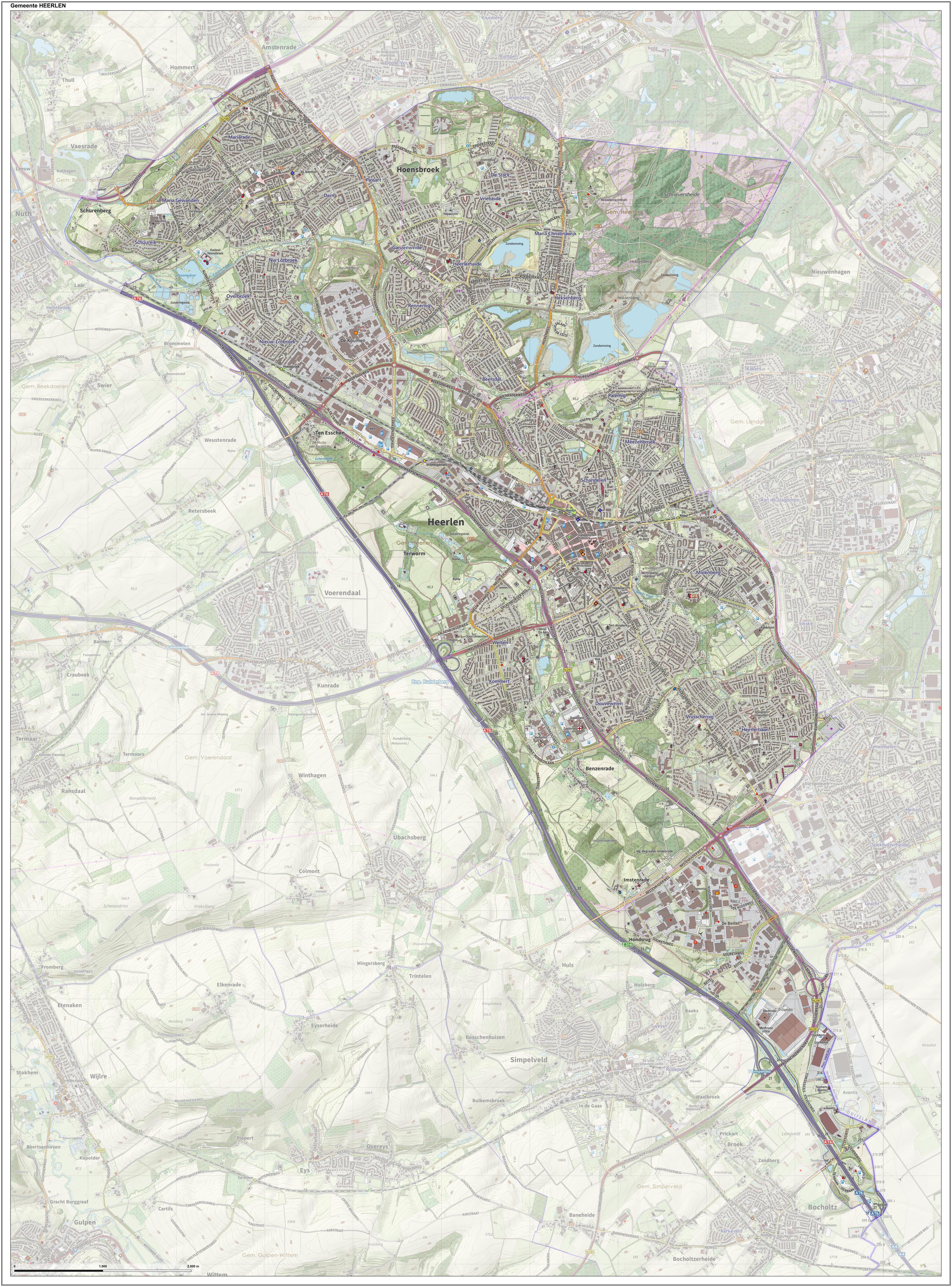 Topografische gemeentekaart. Resolutie: 400 pixels/km. Kaartbeeld samengesteld uit de open geodata van de Top10NL en Top25namen (Kadaster), Creative Commons-BY licentie. Gebouwvlakken uit open geodata BAG extract. Wegen uit de OpenStreetMap, OpenStreetMap community. Reliëfschaduw uit de Actuele Hoogtekaart AHN2. Samenstelling en kleurenschema: Jan-Willem van Aalst, met QGIS. Zie ook de Legenda.